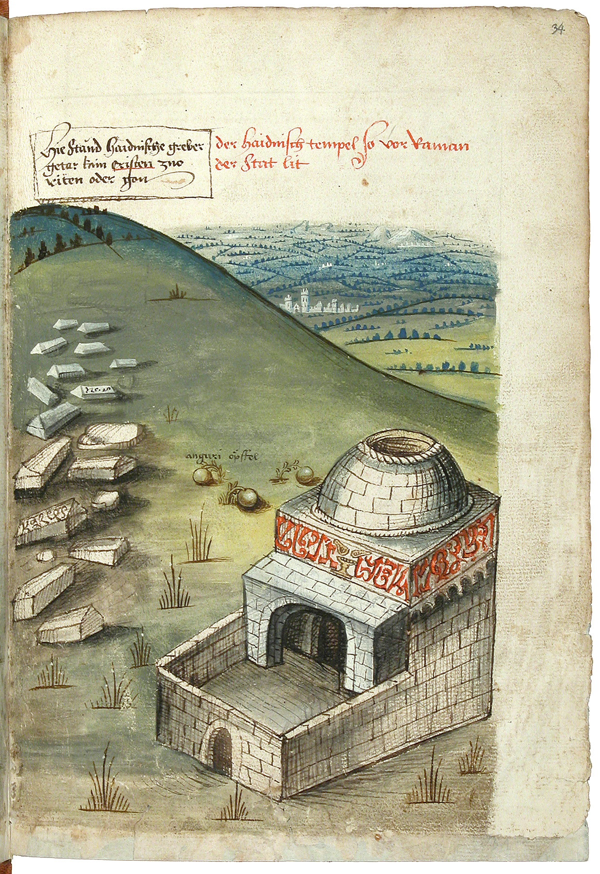 Schilderung einer Pilgerreise von Konstanz nach Jerusalem durch Konrad von Grünenberg, um 1487 Konrad von Grünenberg: Beschreibung der Reise von Konstanz nach Jerusalem - Cod. St. Peter, pap. 32. Handschrift, Bodenseegebiet (Konstanz?), um 1487. II + 53 Blätter, 32x21, mit 31 kolorierten Zeichnungen der Reiseroute von Venedig bis Palästina. Text in alemannischer Mundart.